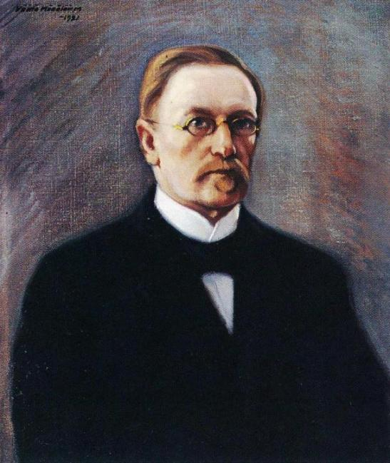 Kansallis-Osake-Pankin tilaama postuumi muotokuva hallintoneuvostonsa puheenjohtajasta Isak Fellmanista (1841–1919).